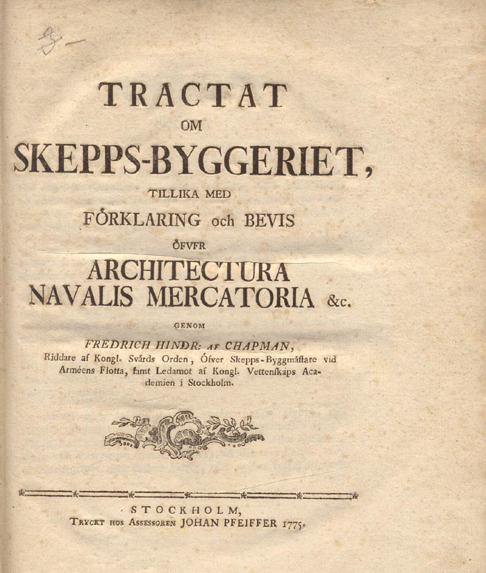 Första sidan till "Tractat om Skeppsbyggeriet" av F.H. Chapman, publicerat 1775.